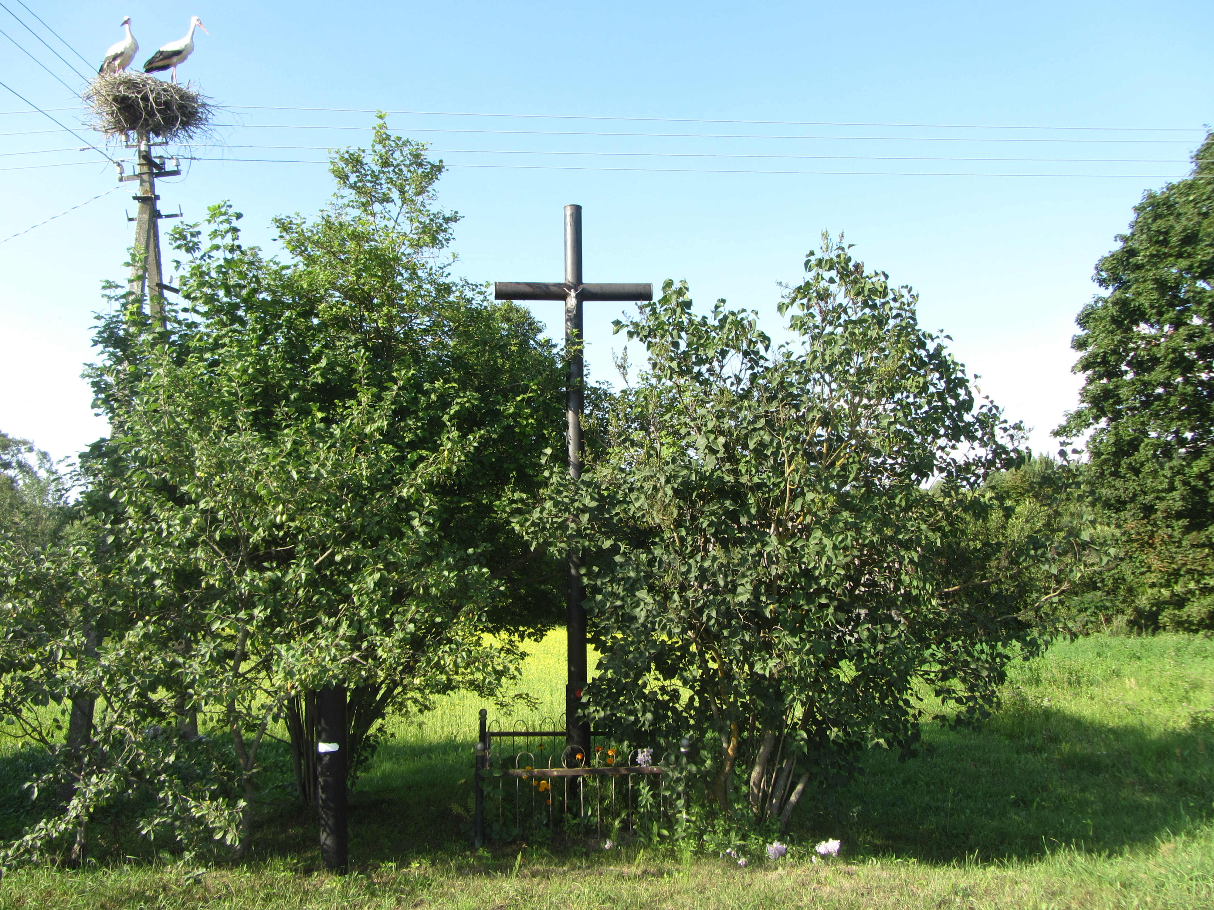 Pivorai 30150, Lithuania